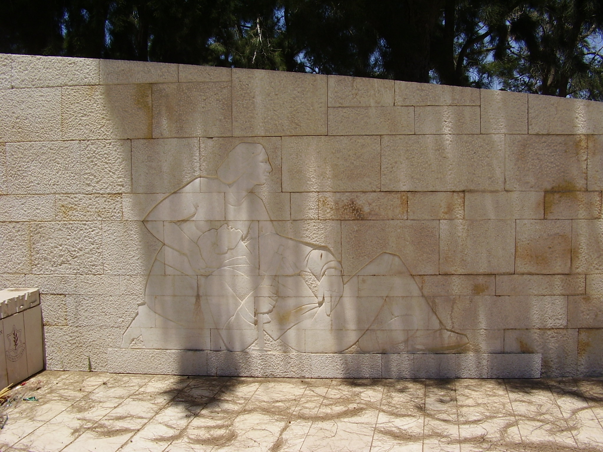 תבליט בקבר האחים לחללי ניצנים במלחמת העצמאות רישיון נוצר על ידי משתמש:Avi1111